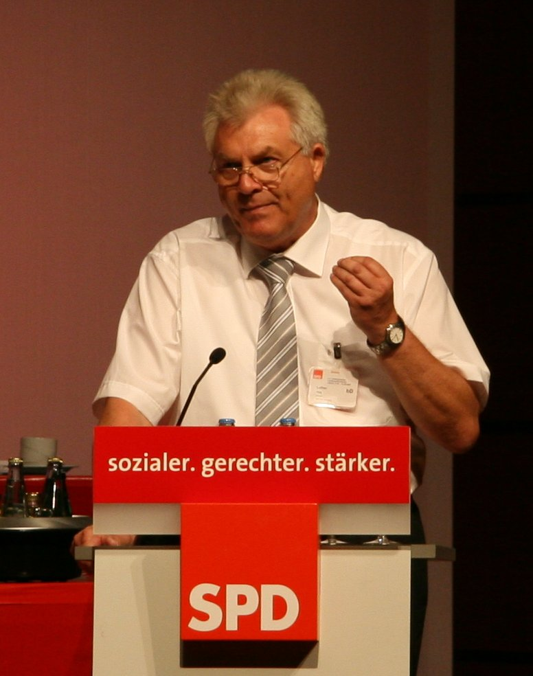 Lothar Hay, zweiter Tag des SPD Landesparteitag in Lübeck, August 2009